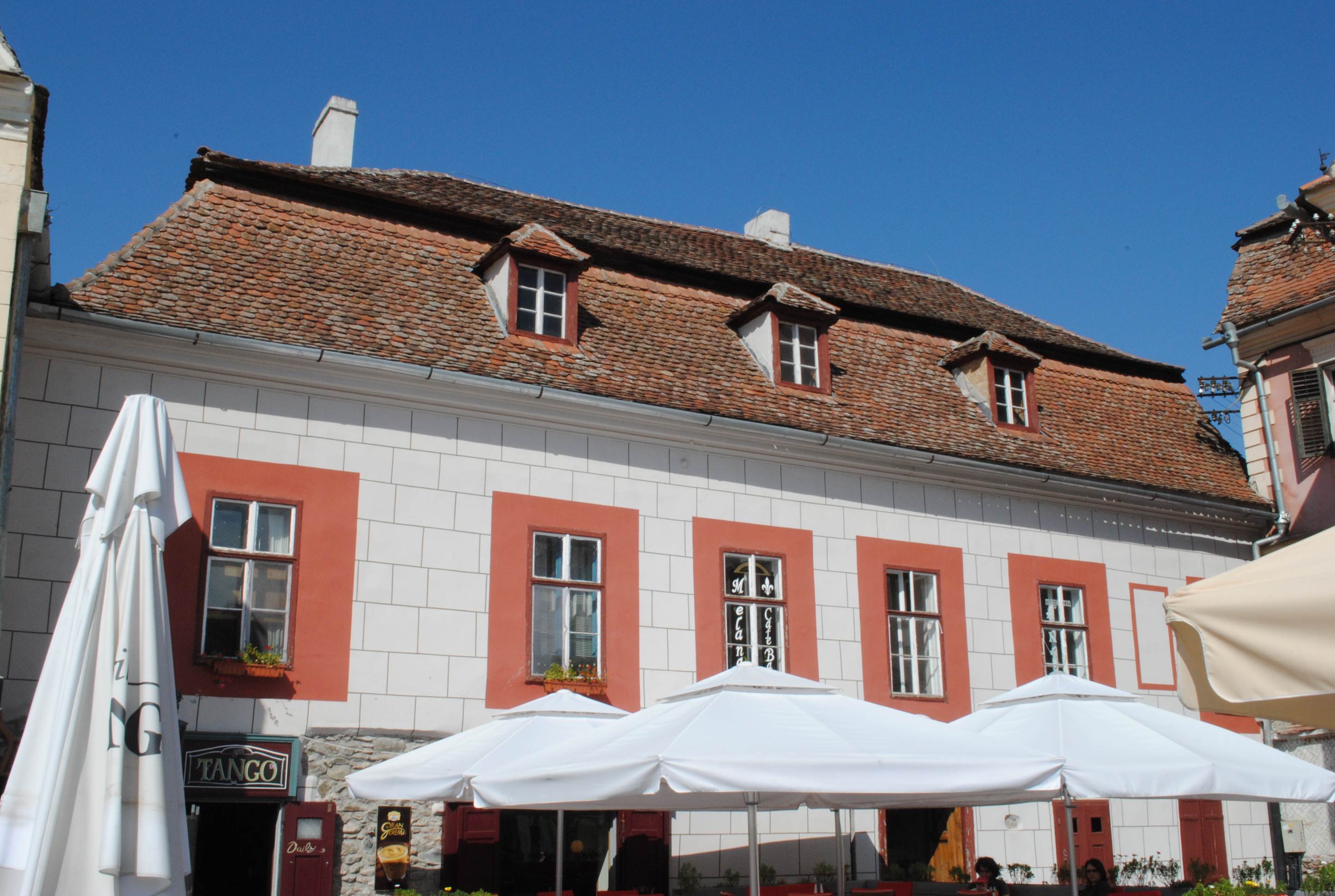 Casă (înglobează turn de apărare - incinta III), sec. XV - XVI, 1750-1800